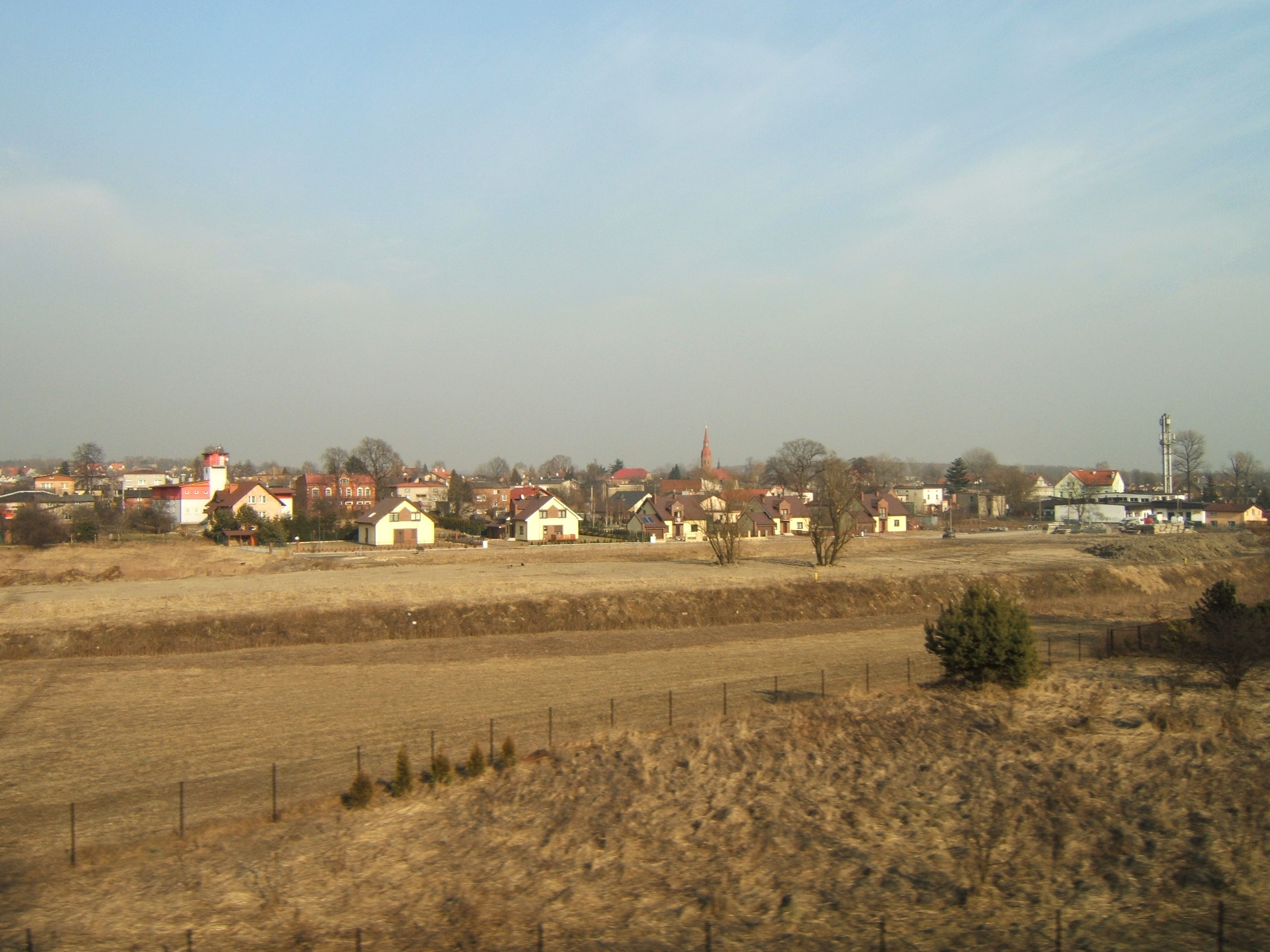 Panorama dzielnicy Podlesie w mieście Katowice